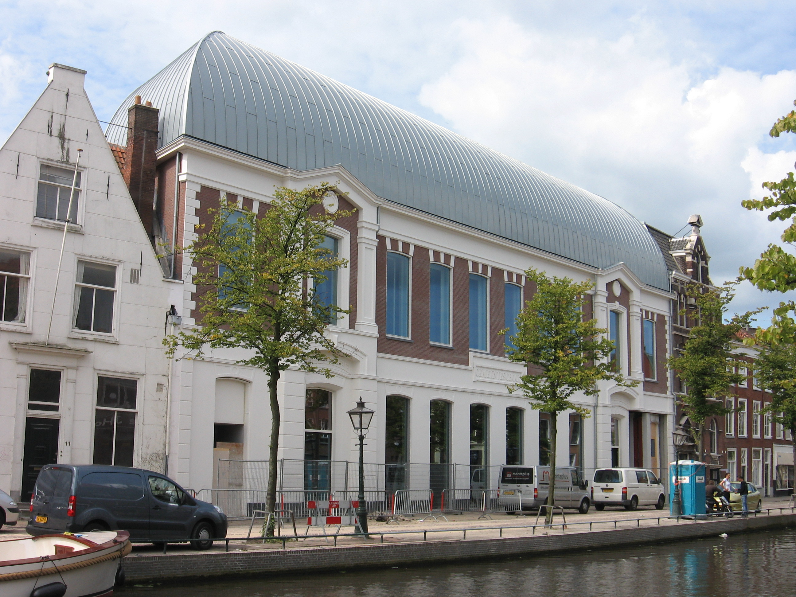 Aalmarkt 11 Dit pand maakte vroeger deel uit van het St. Catharinagasthuis, een middeleeuwse zorginstelling die zich uitstrekte tussen de Breestraat en de Aalmarkt.